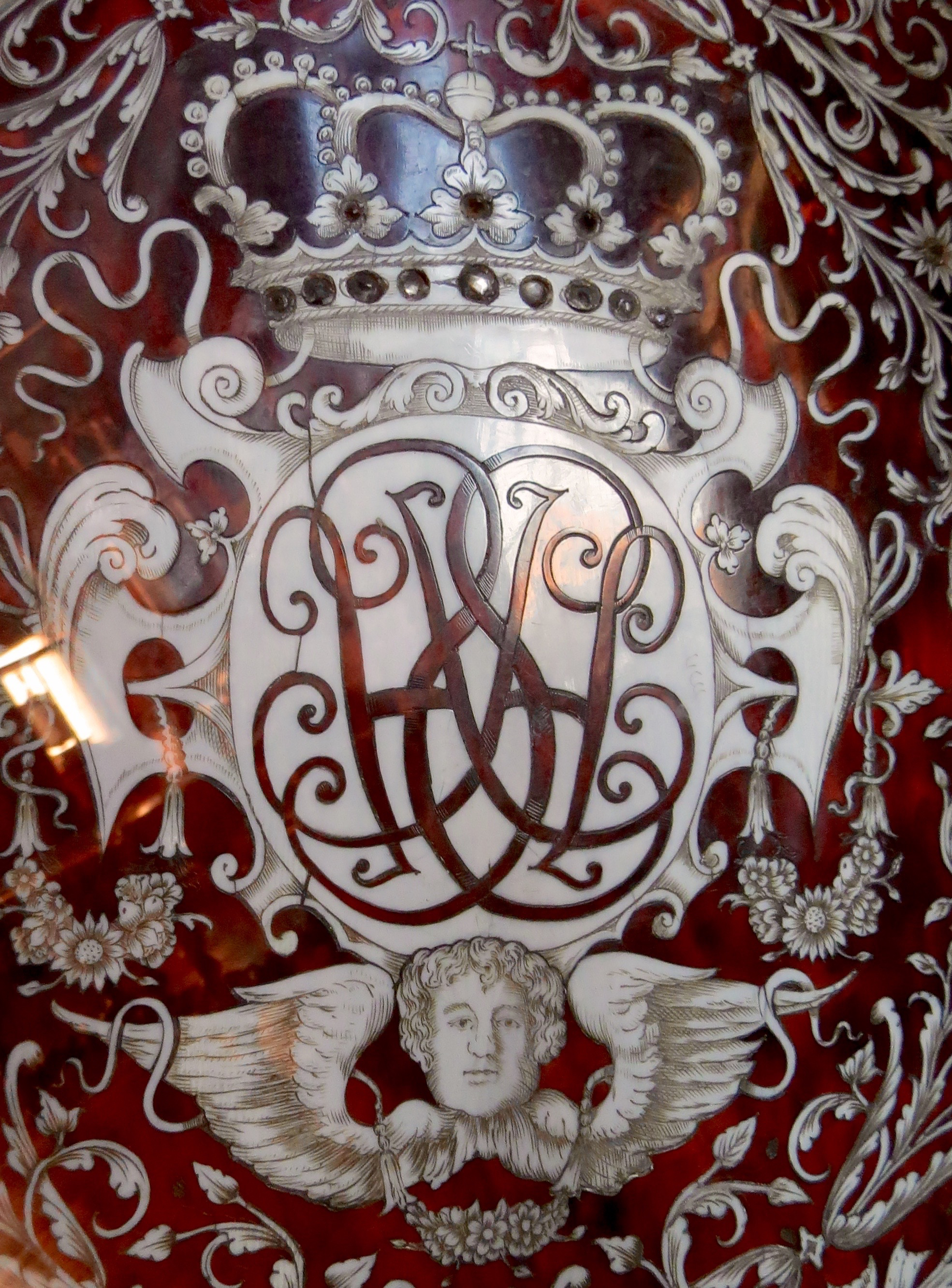 Prinsesse Sophie Hedevig af Danmark og Norges (1677-1735) navnetræk fra guitar på Rosenborg Slot, København